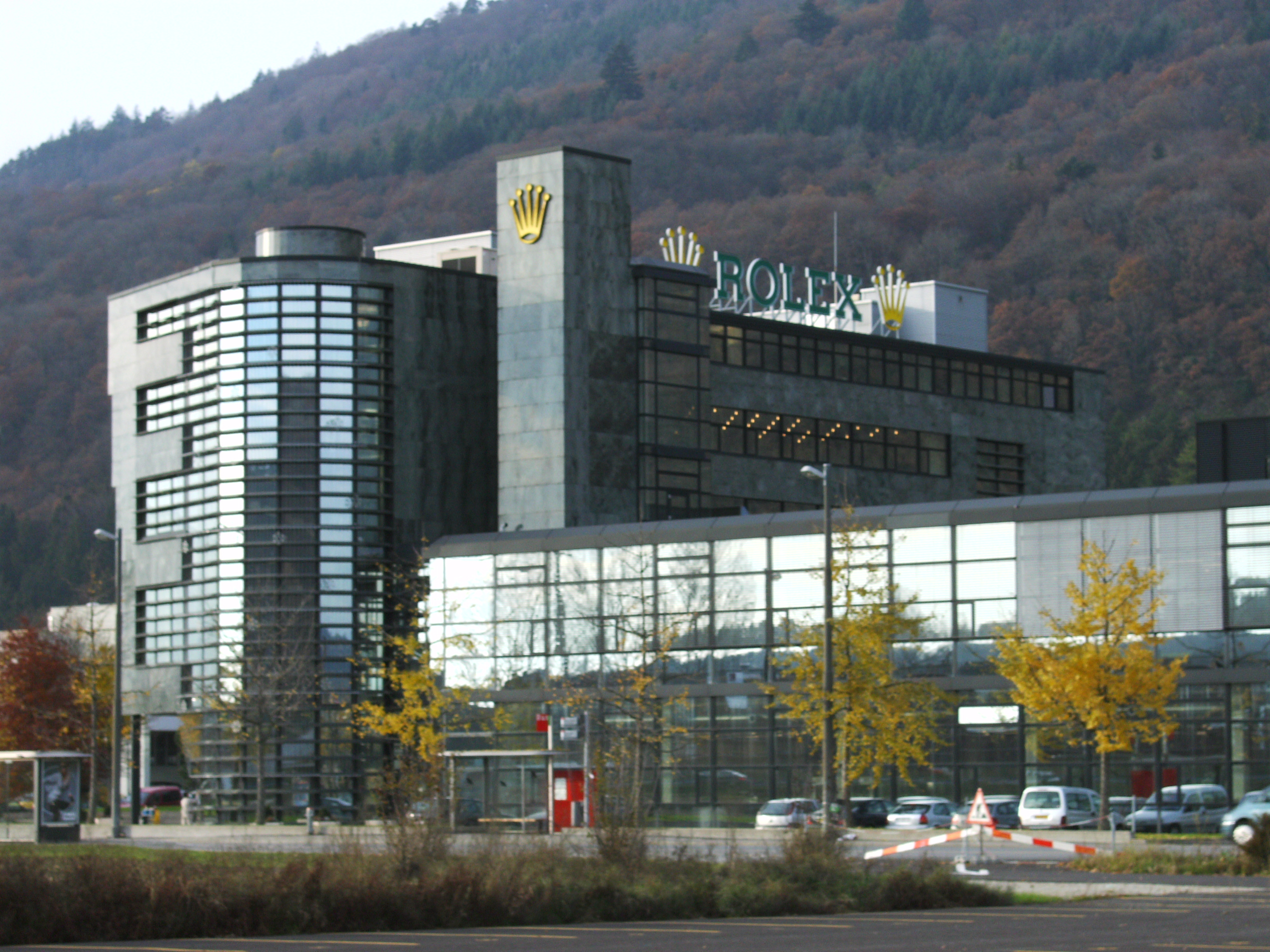 Bâtiment de la société Rolex à Bienne (canton de Berne, Suisse)